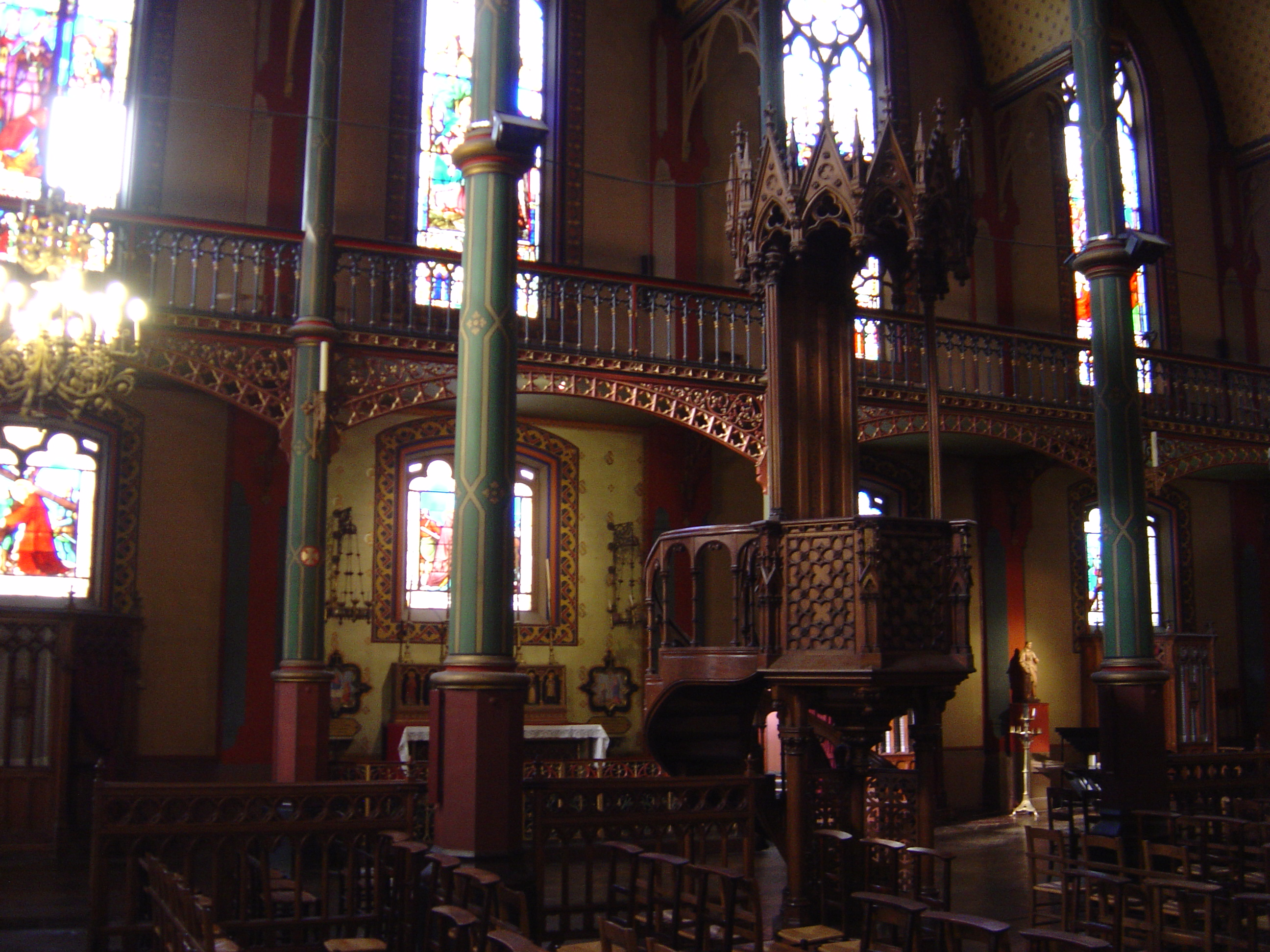 Chaire de l'église Saint-Eugène à Paris